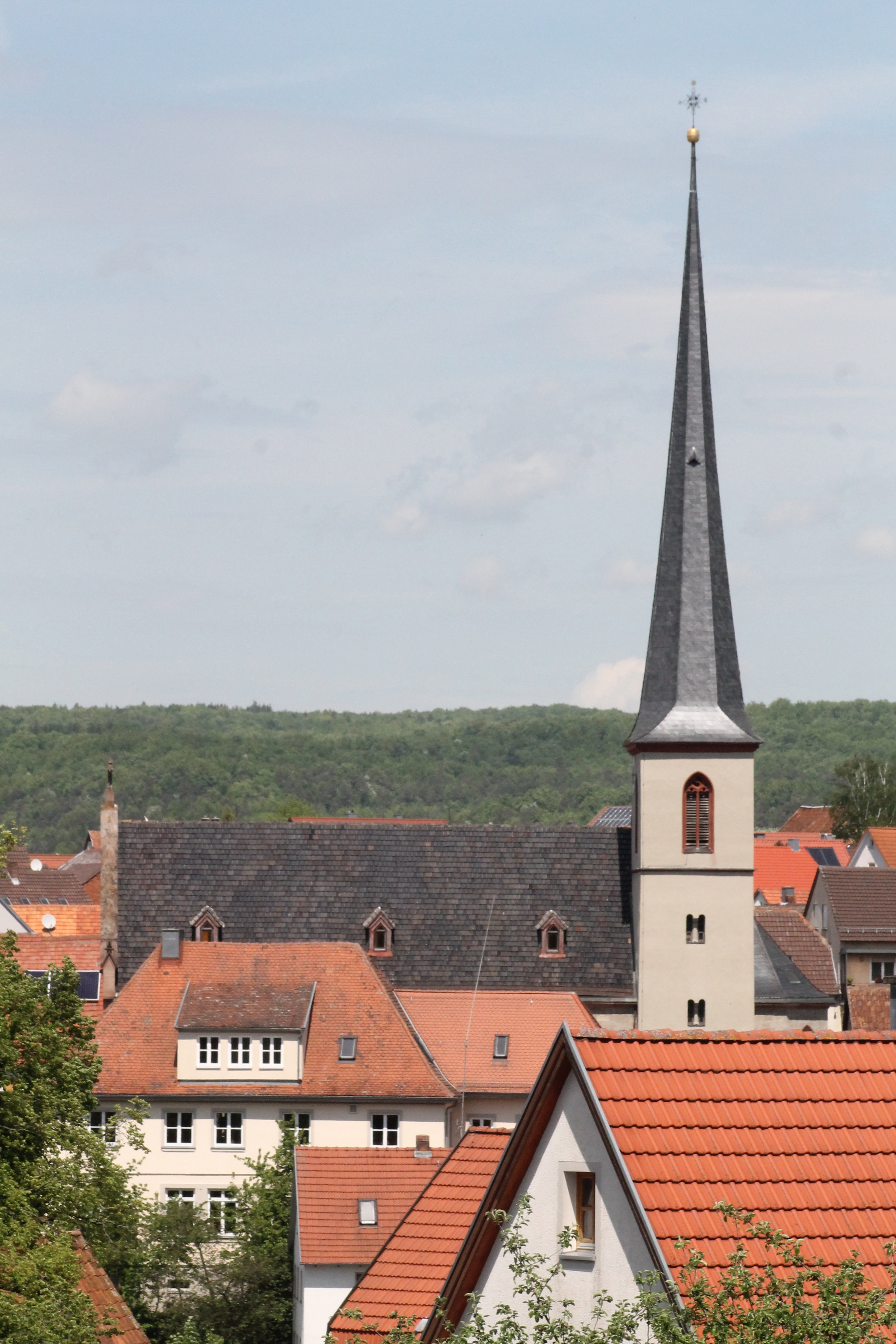 Kirche Wollbach - OpenStreetMap (Info)